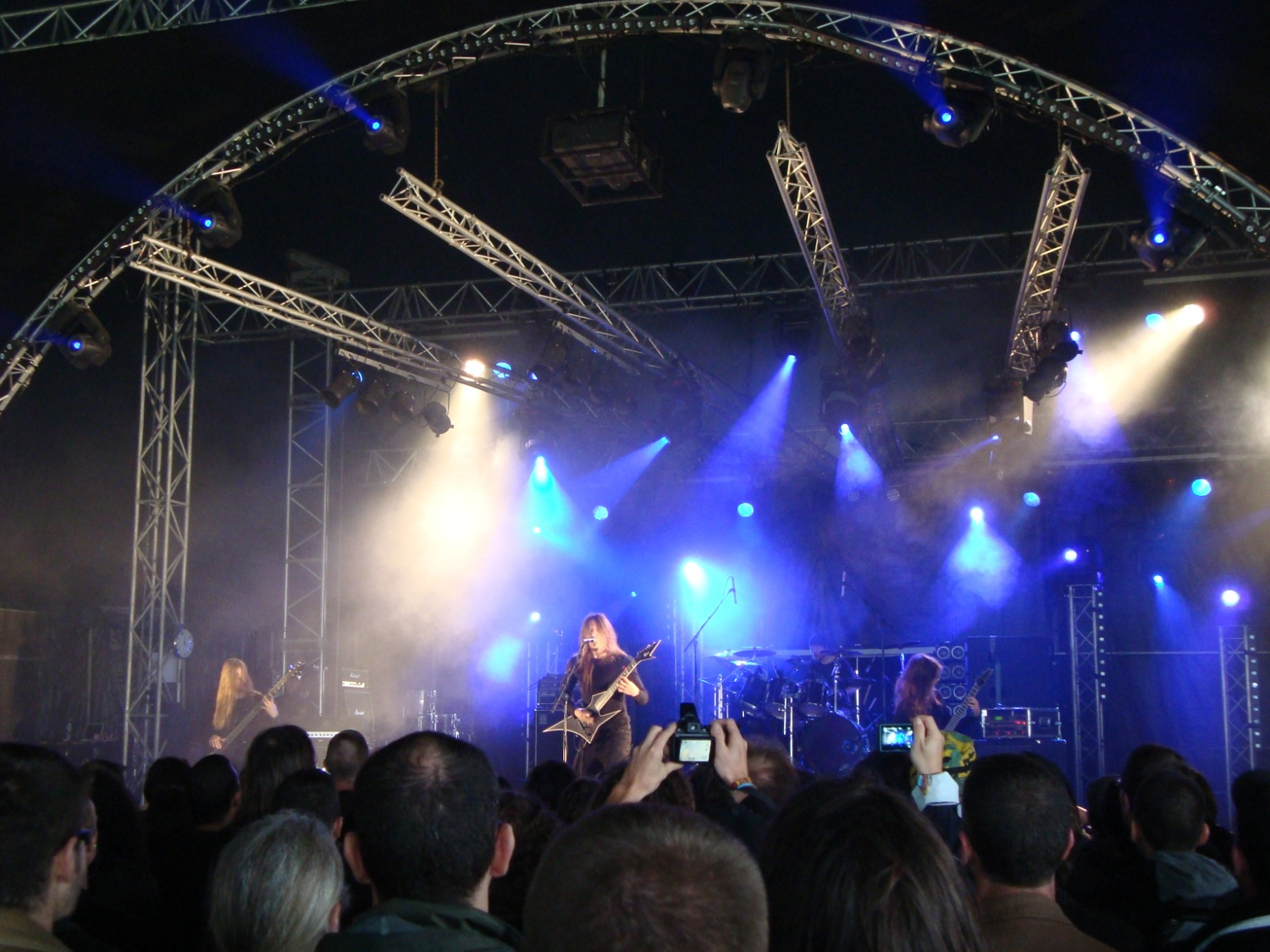 Obscura at Hellfest 2010.